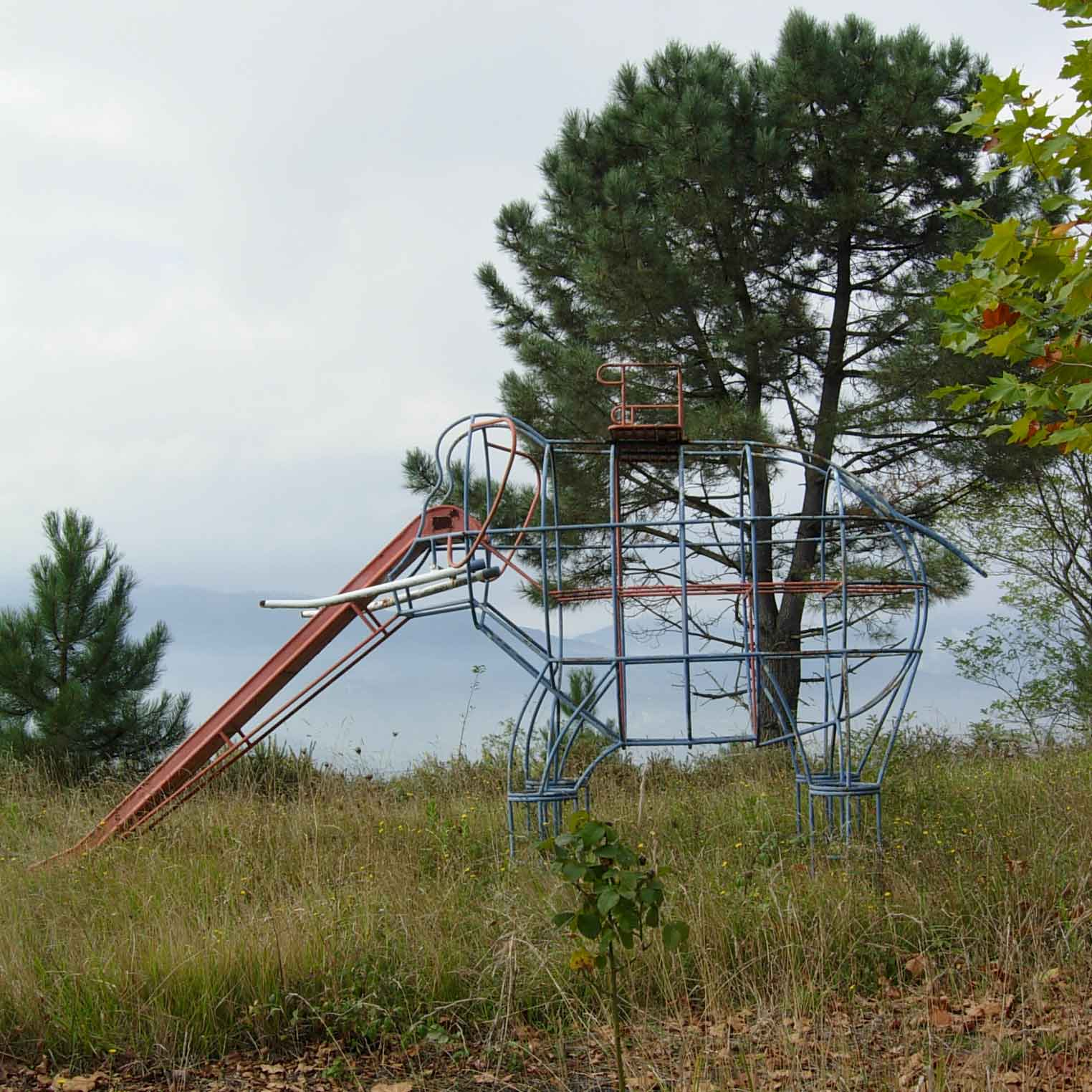 Columpio Elefante Parque de Atracciones de Vizcaya